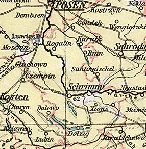 Kreis Schrimm as from 1900 to 1919